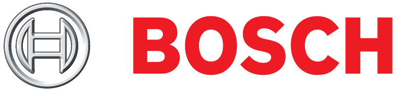 ಕನ್ನಡ: Bosch logo